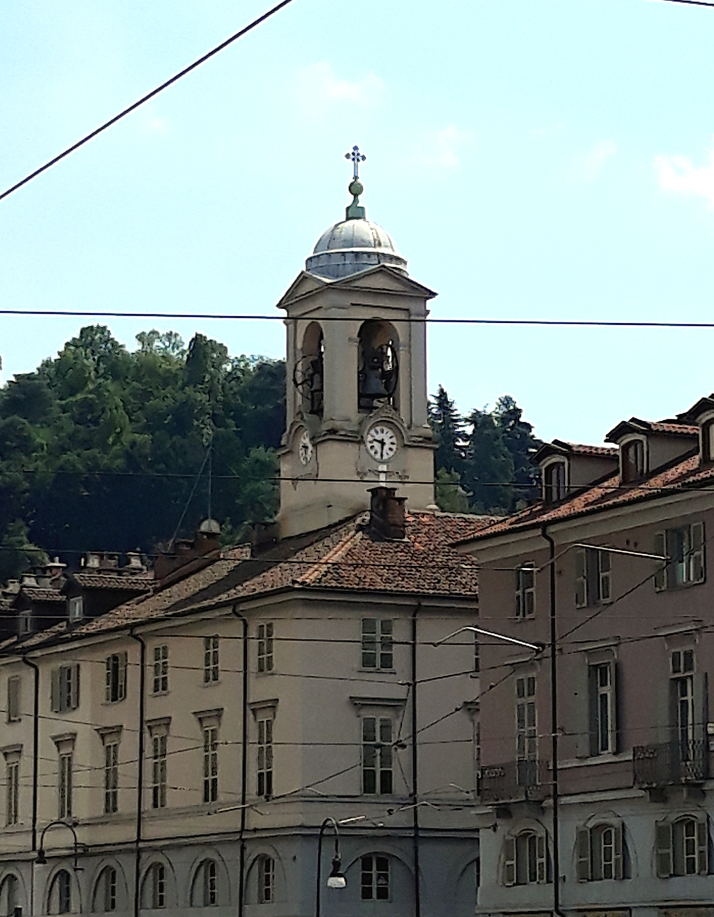 Campanile della chiesa Gran Madre di Dio di Torino